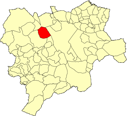 Mapa municipal de Albacete con el municipio de Barrax resaltado en rojo.